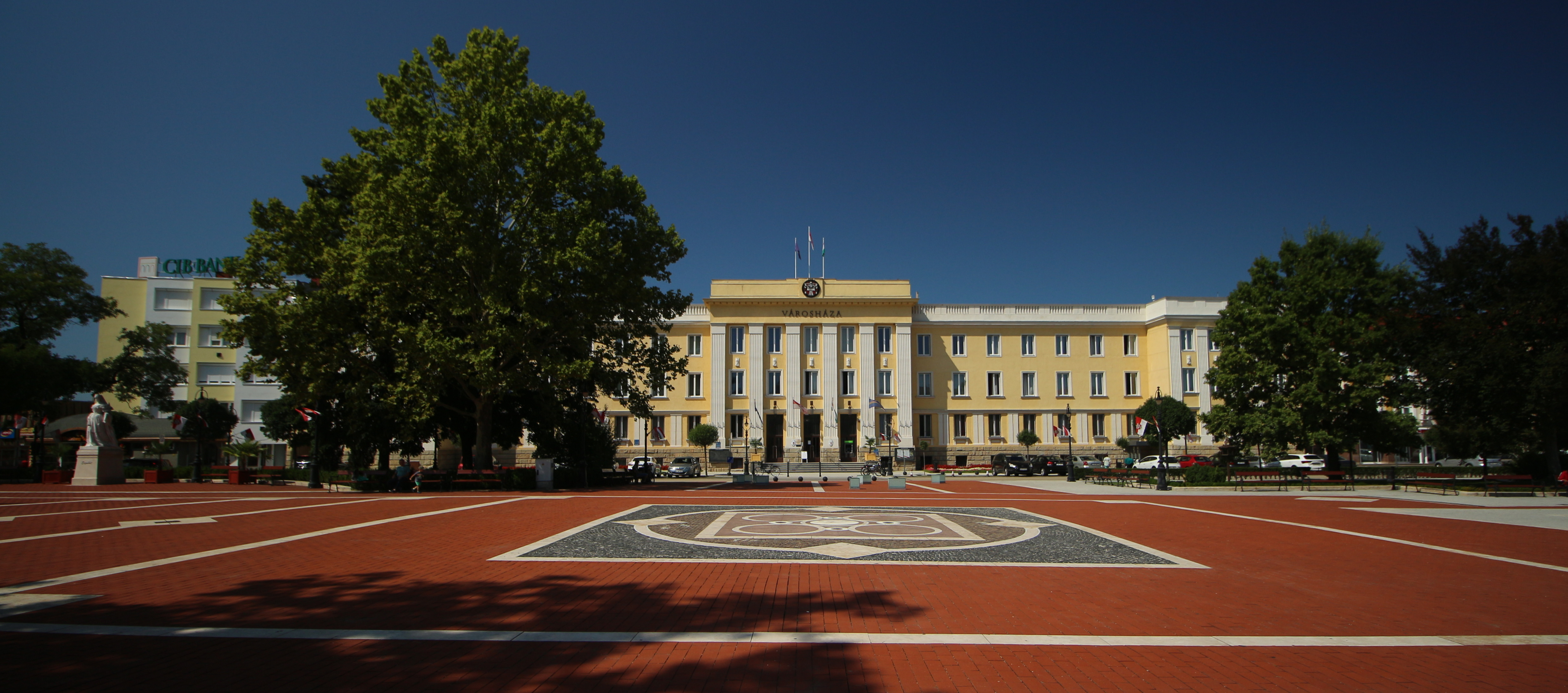 Nagykanizsa (Velká Kanyže) náměstí císařovny Alžběty v centru města